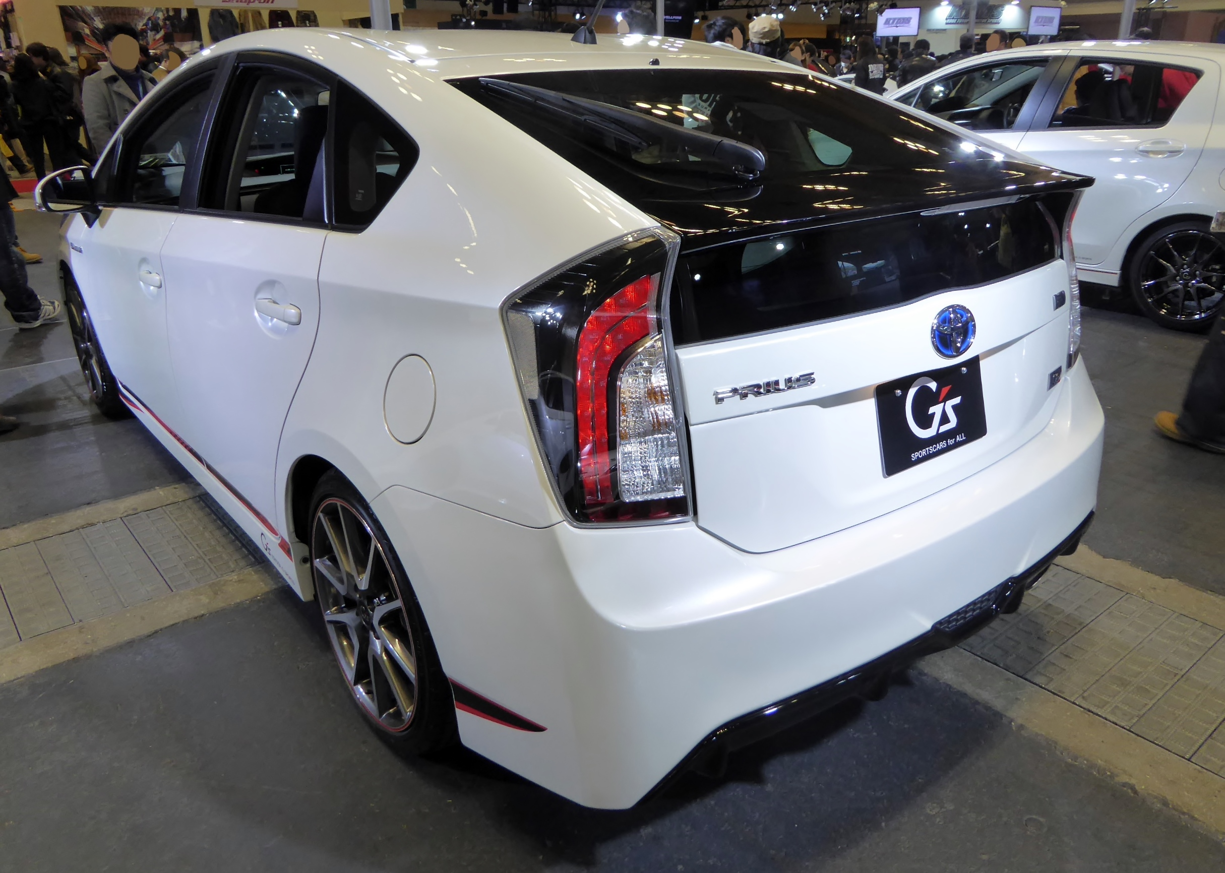 大阪オートメッセ2015においてZVW30型トヨタ・プリウス S"ツーリングセレクション・G's"を撮影。